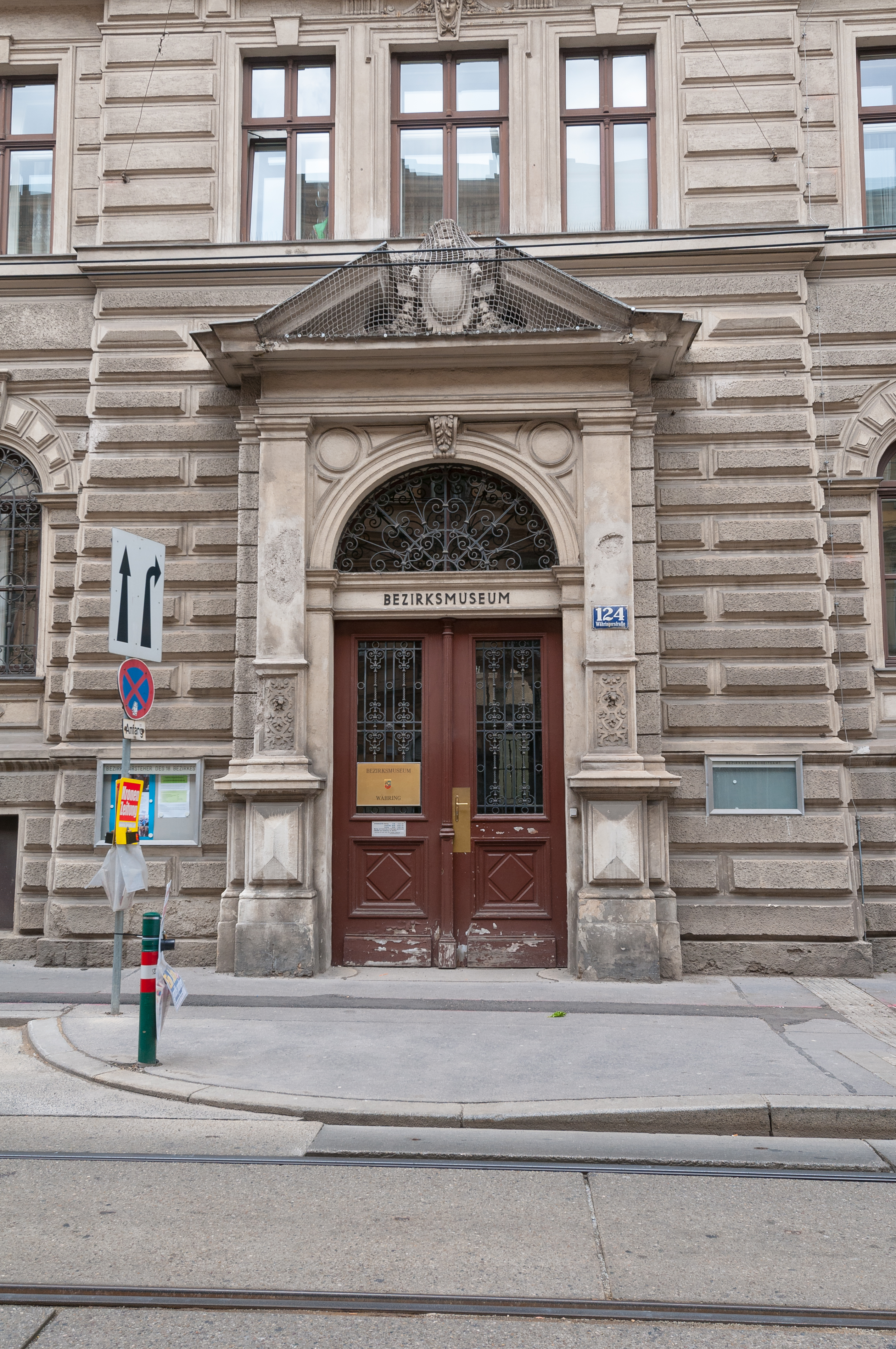 Bezirksmuseum Wien Währing